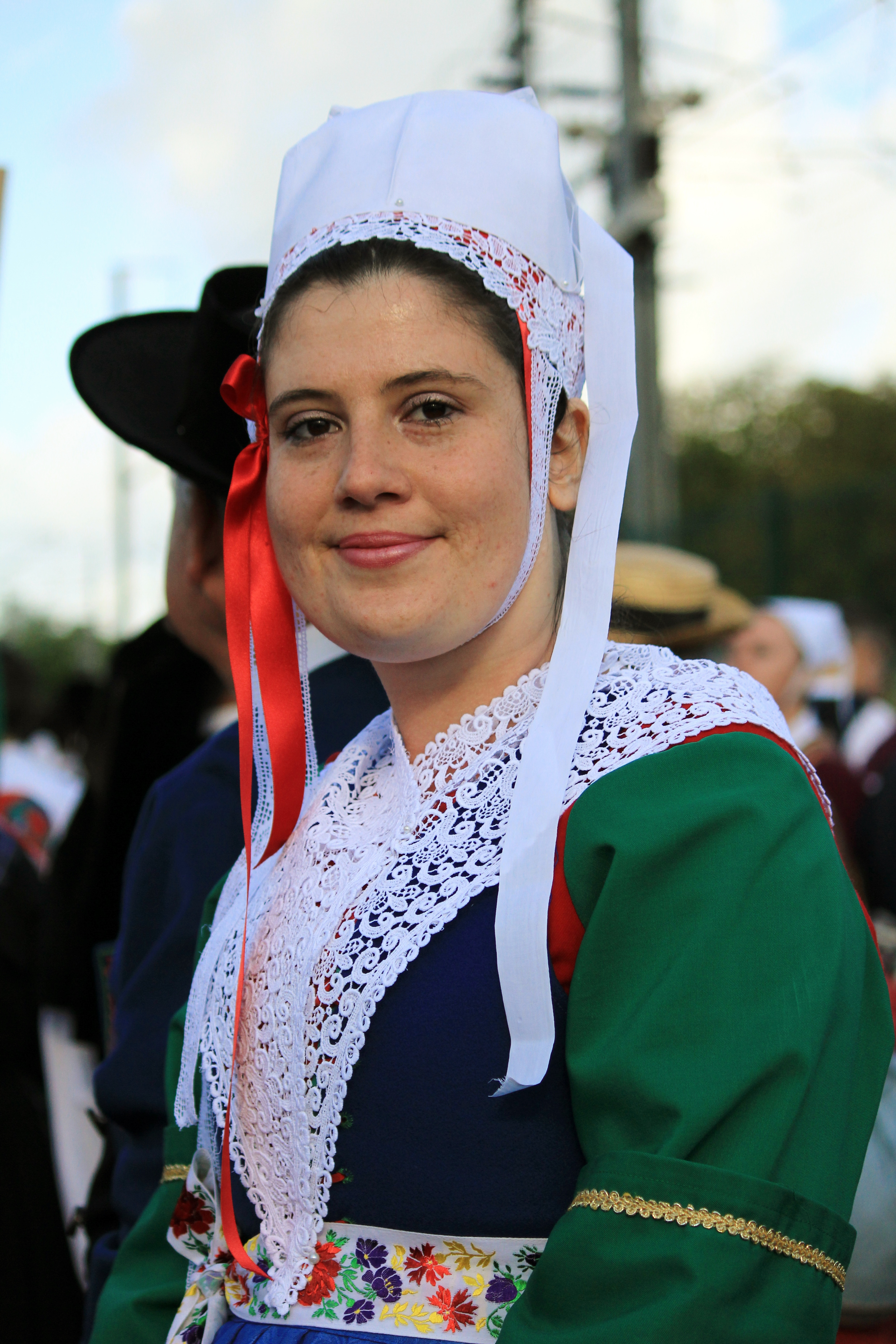 coiffe portée par le Cercle celtique Seiz Avel de la confédération Kendalc'h d'Ile de France lors du FIL 2012